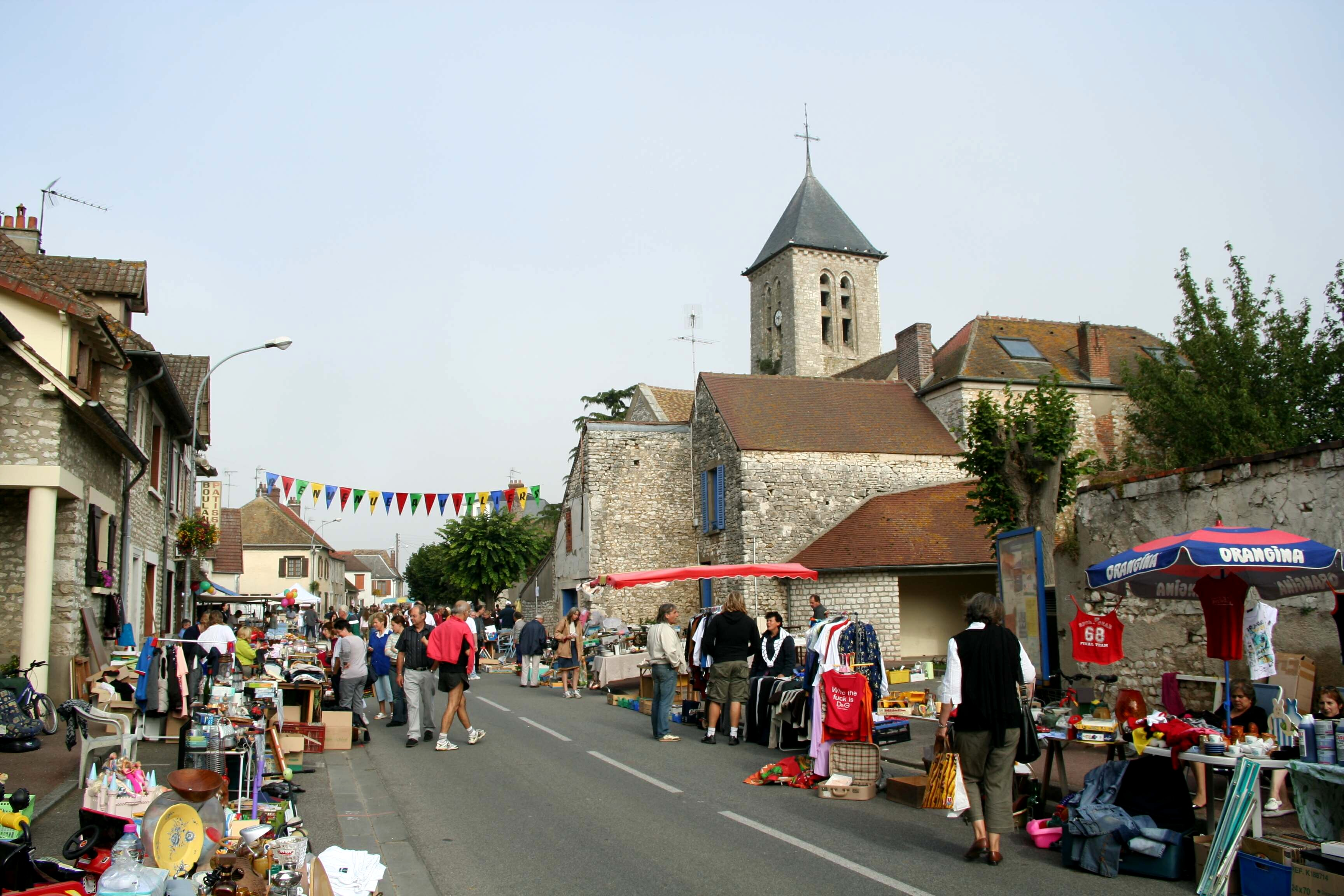 Grande rue de Villiers-en-Désoeuvre - Eure (France), vide-grenier